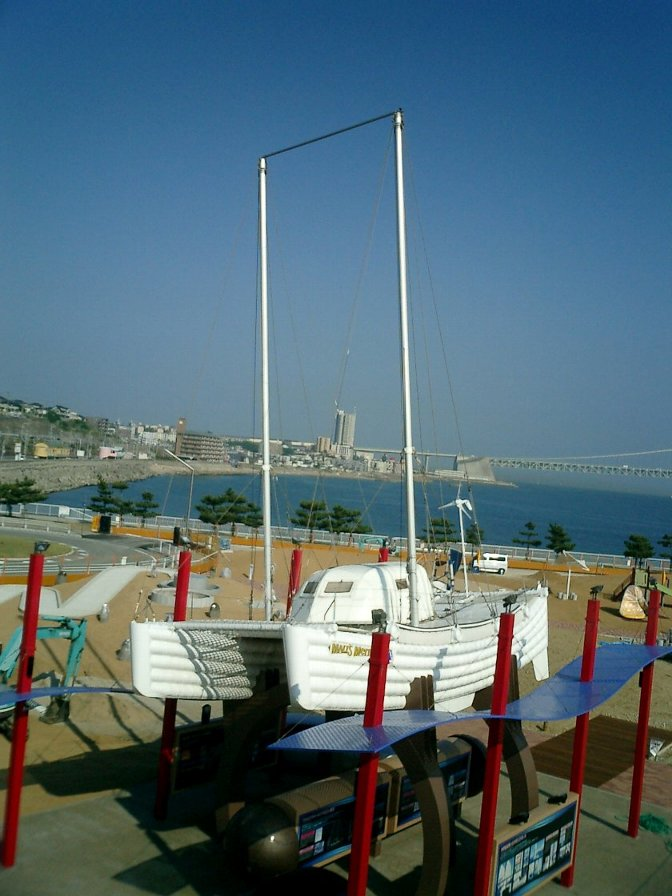 Malt's Mermaid II in Okura Beach, Akashi, Hyogo, Japan.